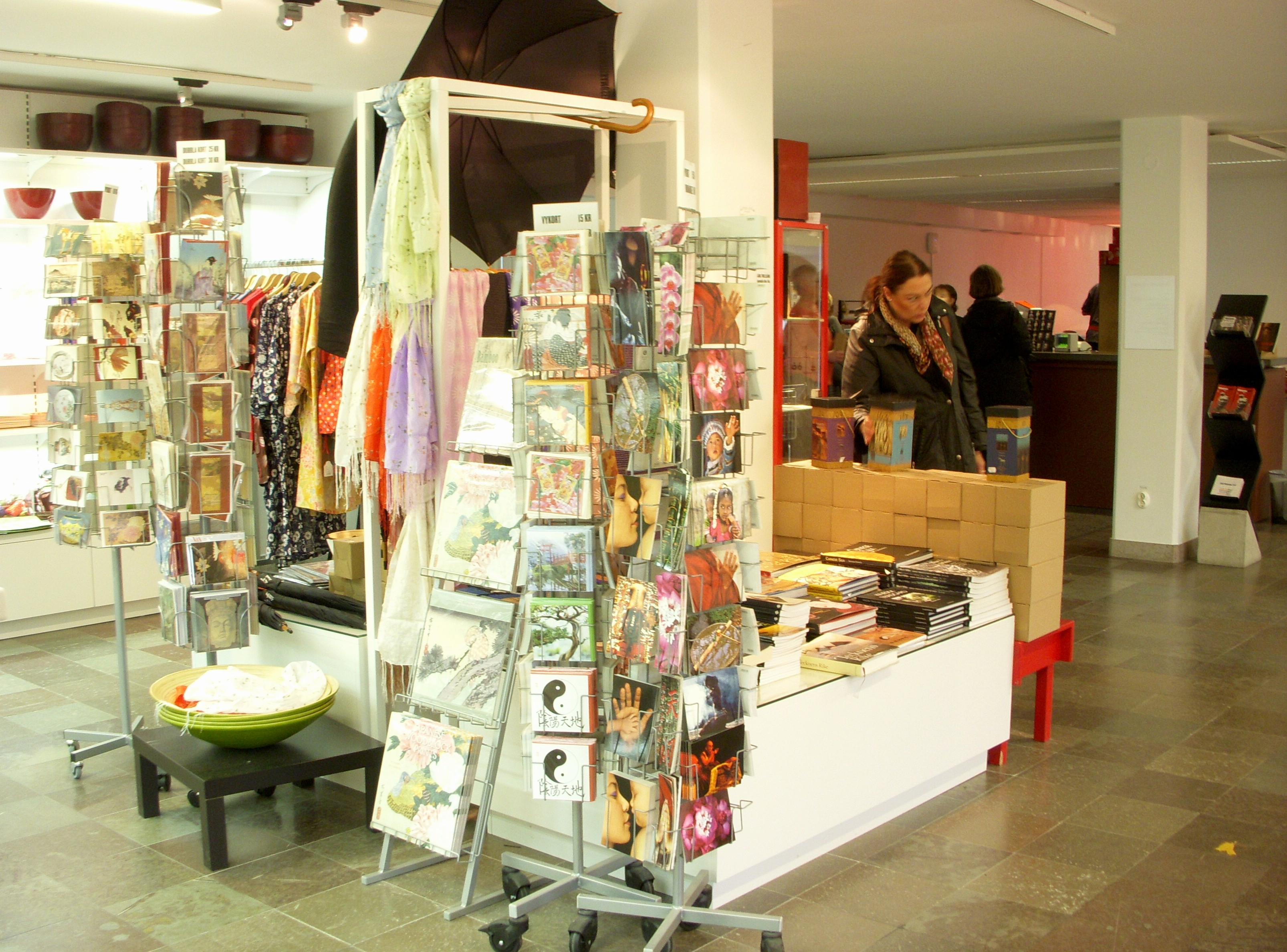 Entrehall och butik på Östasiatiska musset i Stpockholm